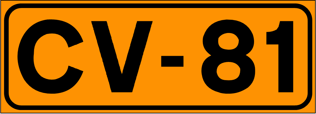 Inidcador de la Carretera de la Comunidad Valenciana CV-81